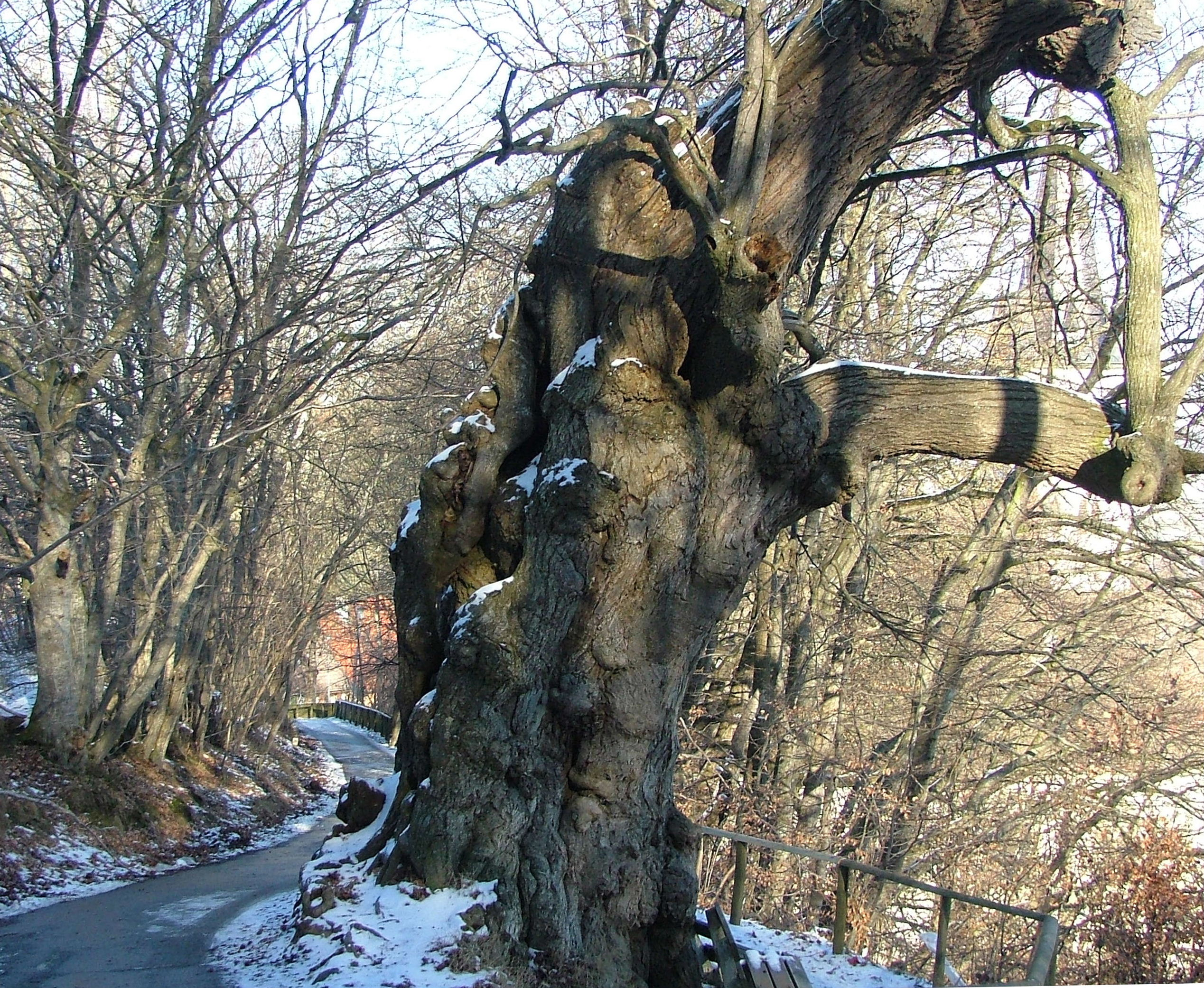 Uralte Linde auf dem Frohberg